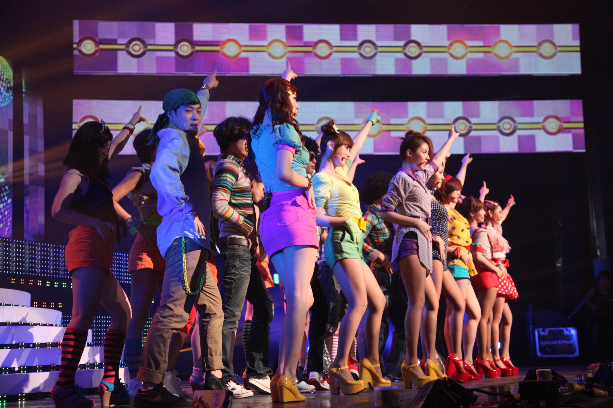 티아라 @ Cyworld Dream Music Festival 싸이월드 드림 뮤직 페스티벌